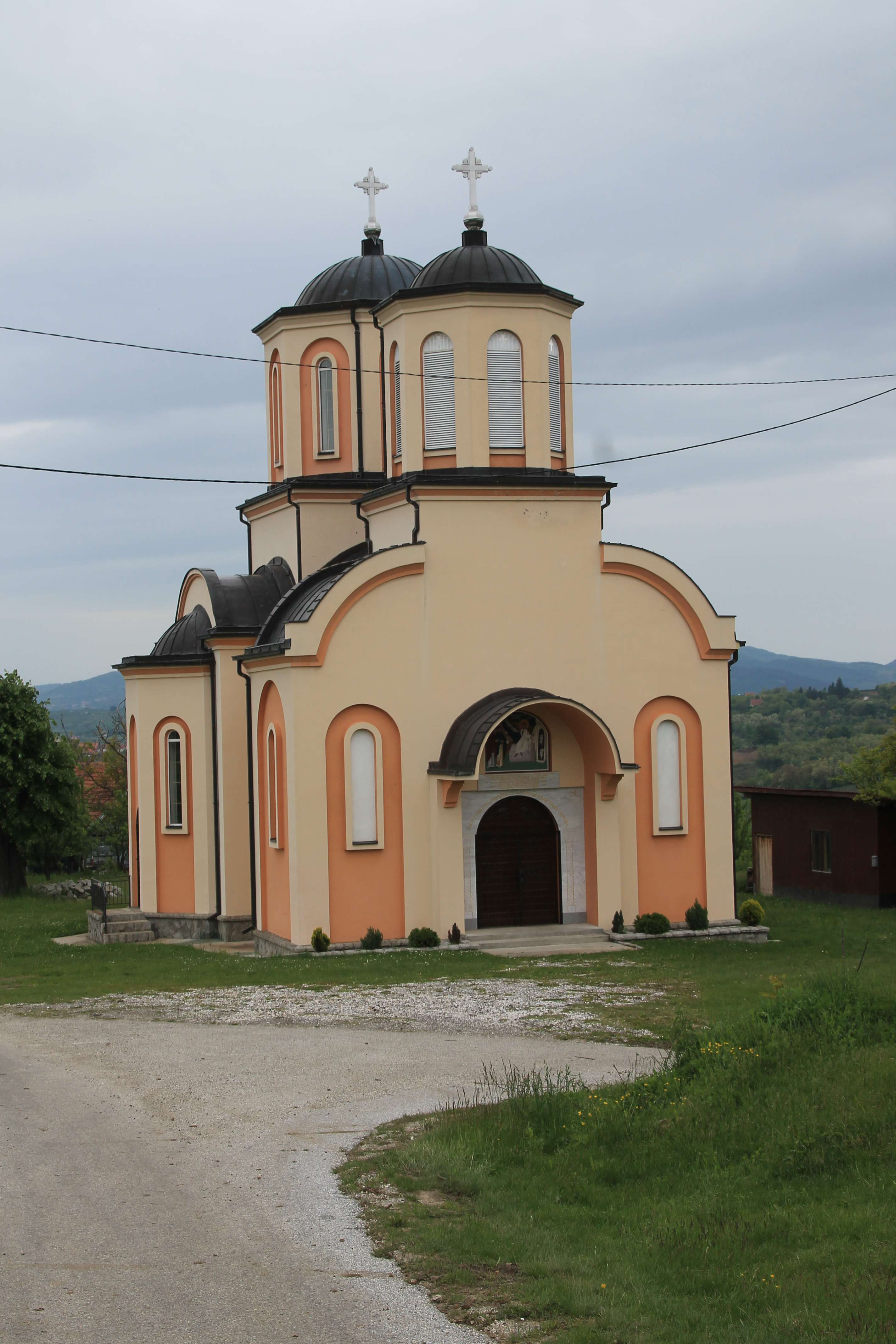 Crkva Sv. Mironosnica (Vinča)